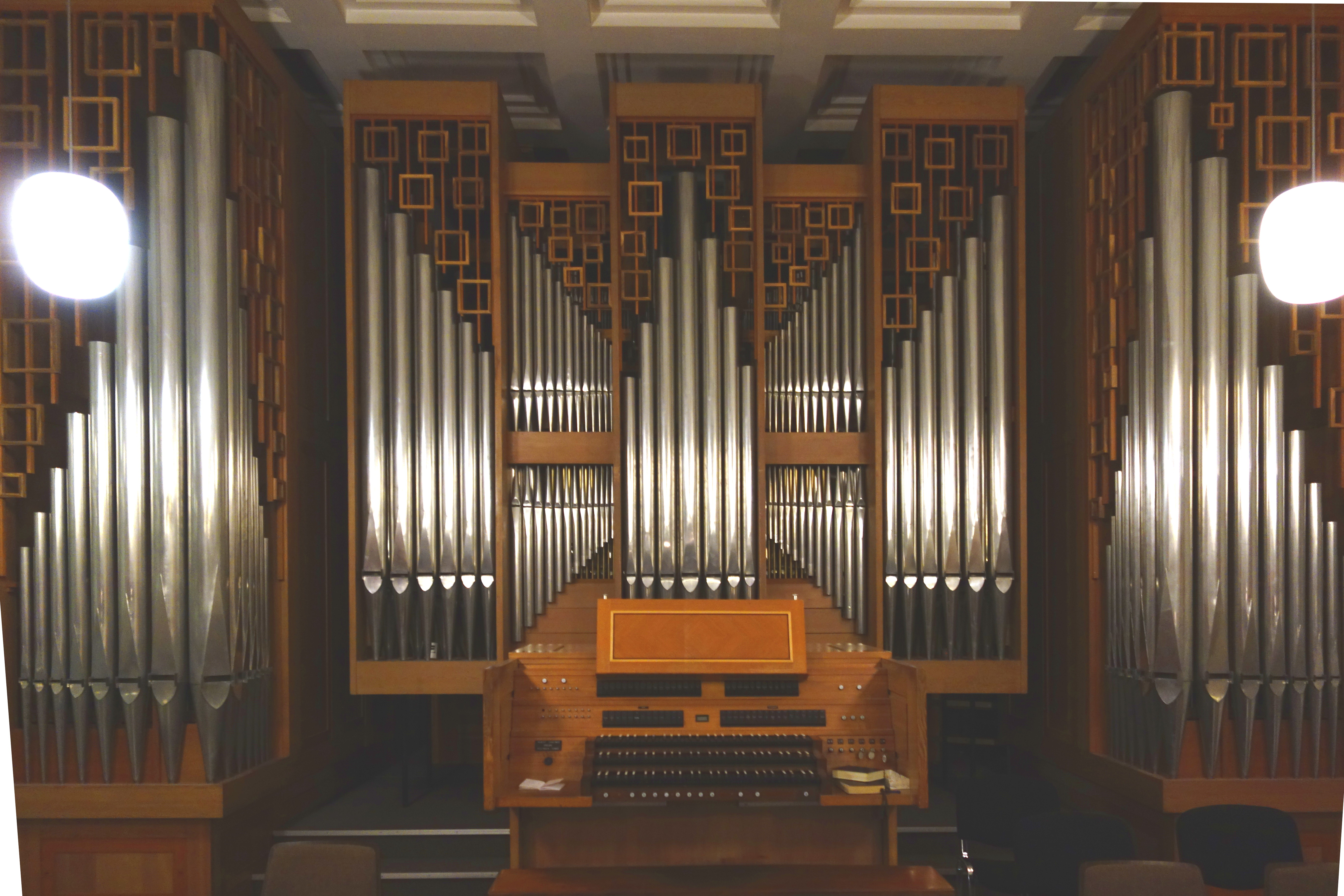 Sandtner-Orgel in der Musikhochschule München (Raum A14) (1974, H. Sandtner, III/49, opus 29)